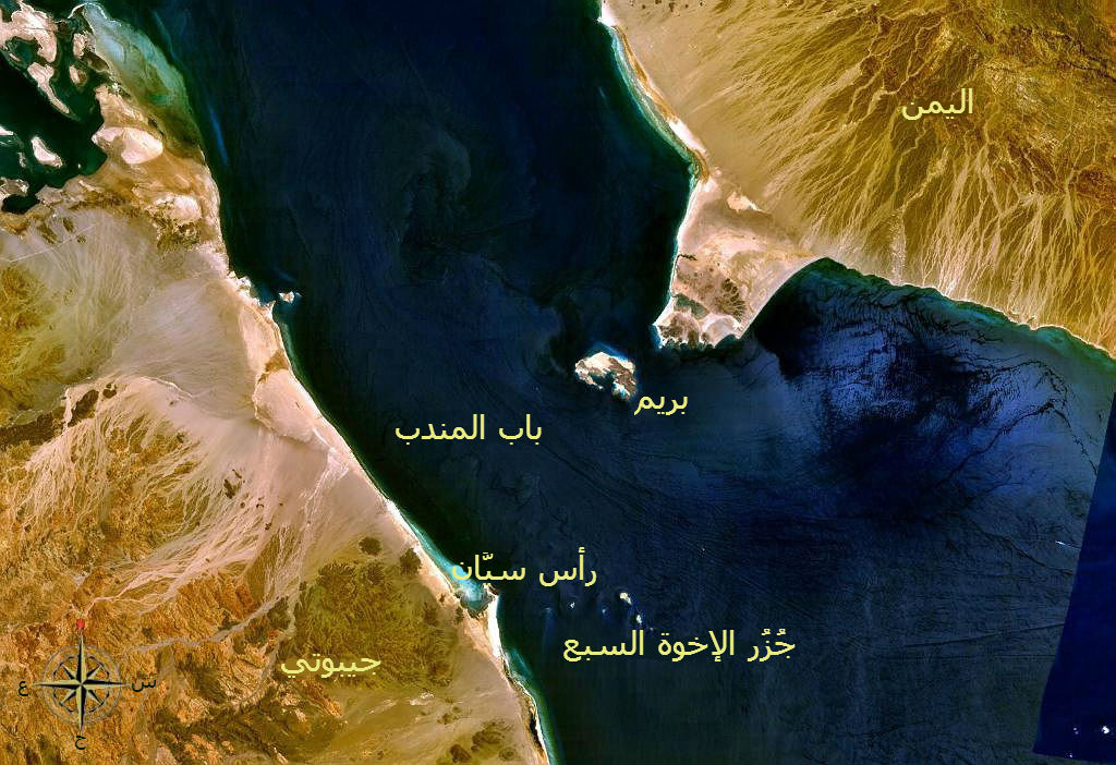 لقطة ساتليَّة مُعلِّمة لِمنطقة باب المندب.